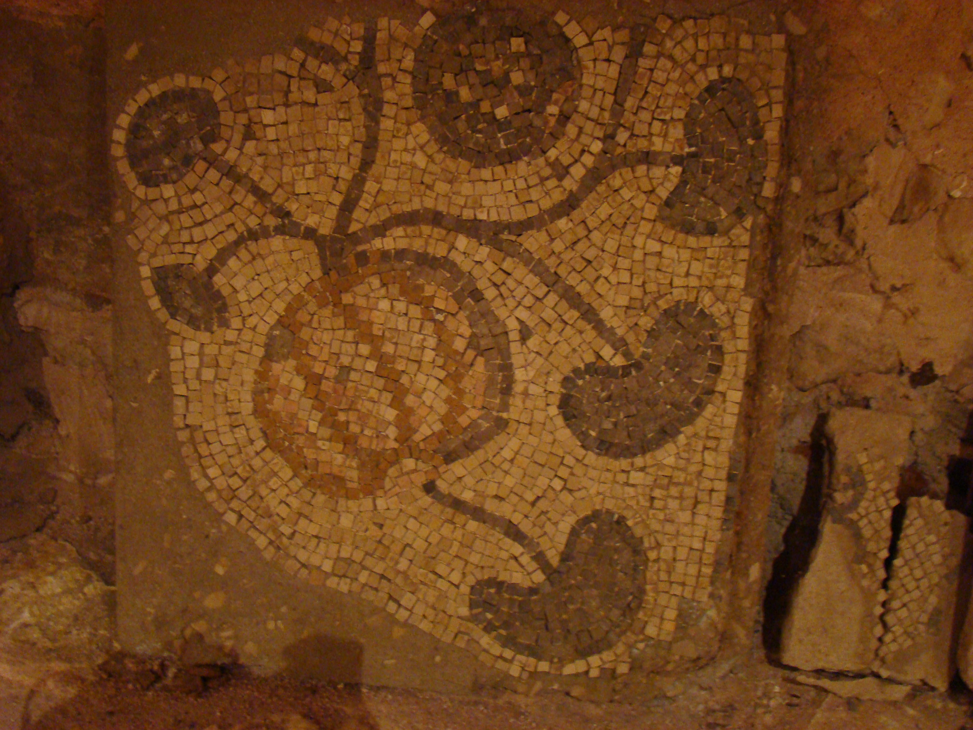 פסיפס בית הכנסת בית אלפא